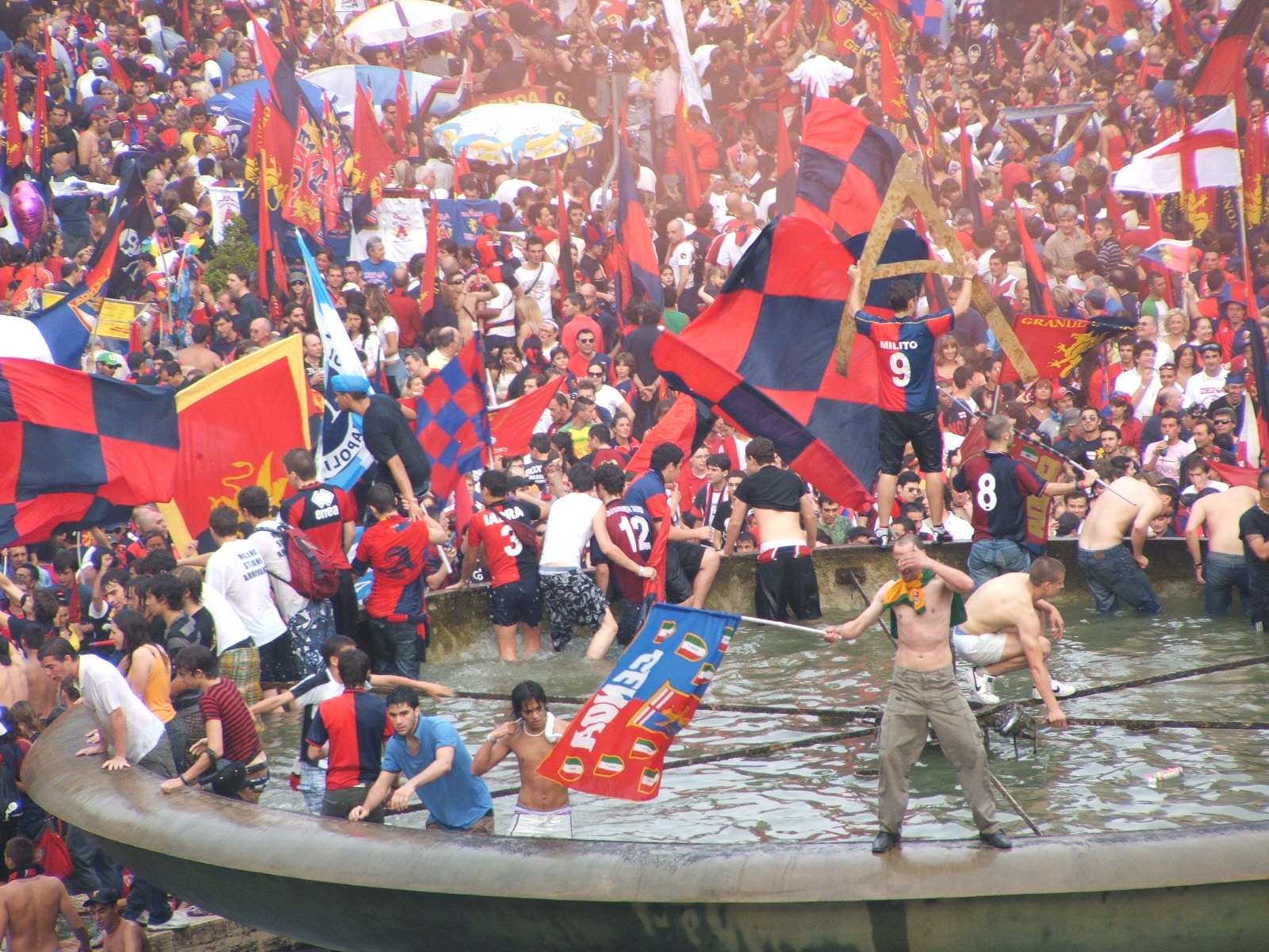 Genova, festeggiamenti per la promozione del Genoa CFC in Serie A